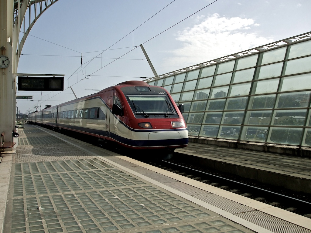 Tipo: Comboio Alfa Pendular 127 [Lisboa - Porto] Local: Gare do Oriente [Linha do Norte, PK 6] Data e hora: 3 de Maio de 2008 [17h09] Material: Automotora 4001 [Comboio de Pendulação Activa]